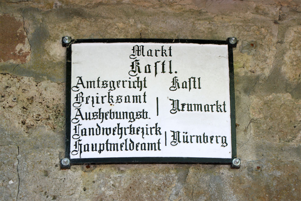 Historische Meldetafel in Kastel (Lauterachtal), Angebracht straßenseitig am Zugang zur Klosterburg